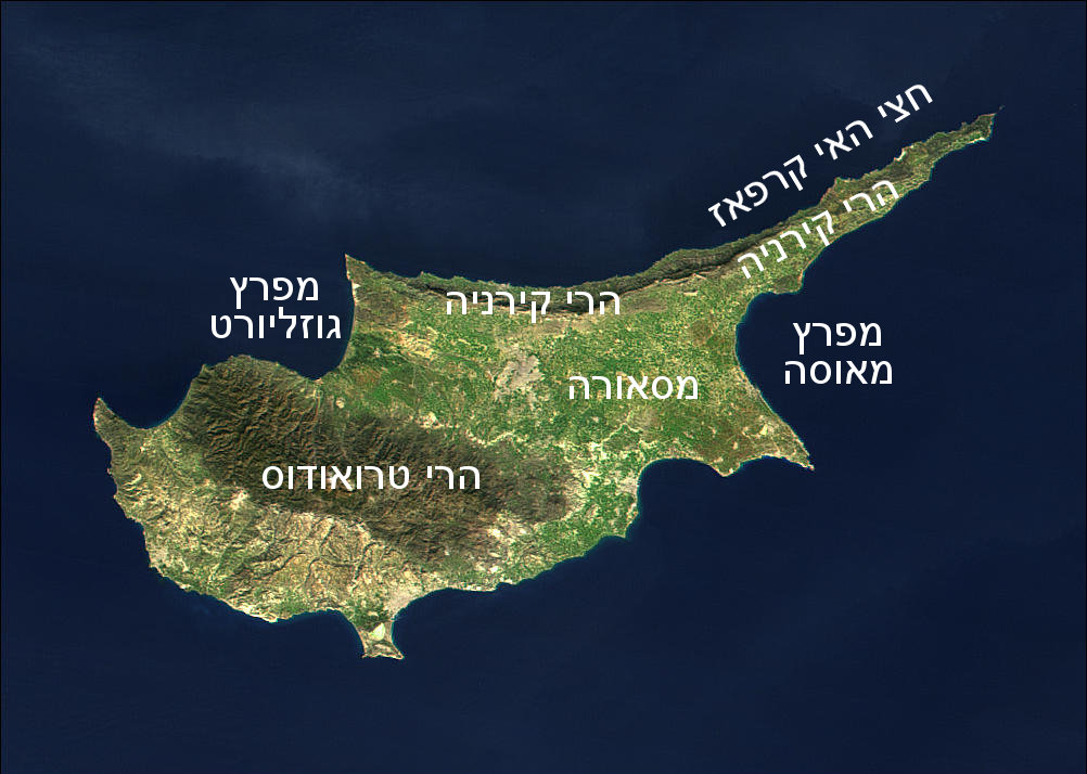 Cipro Geog. Ebr